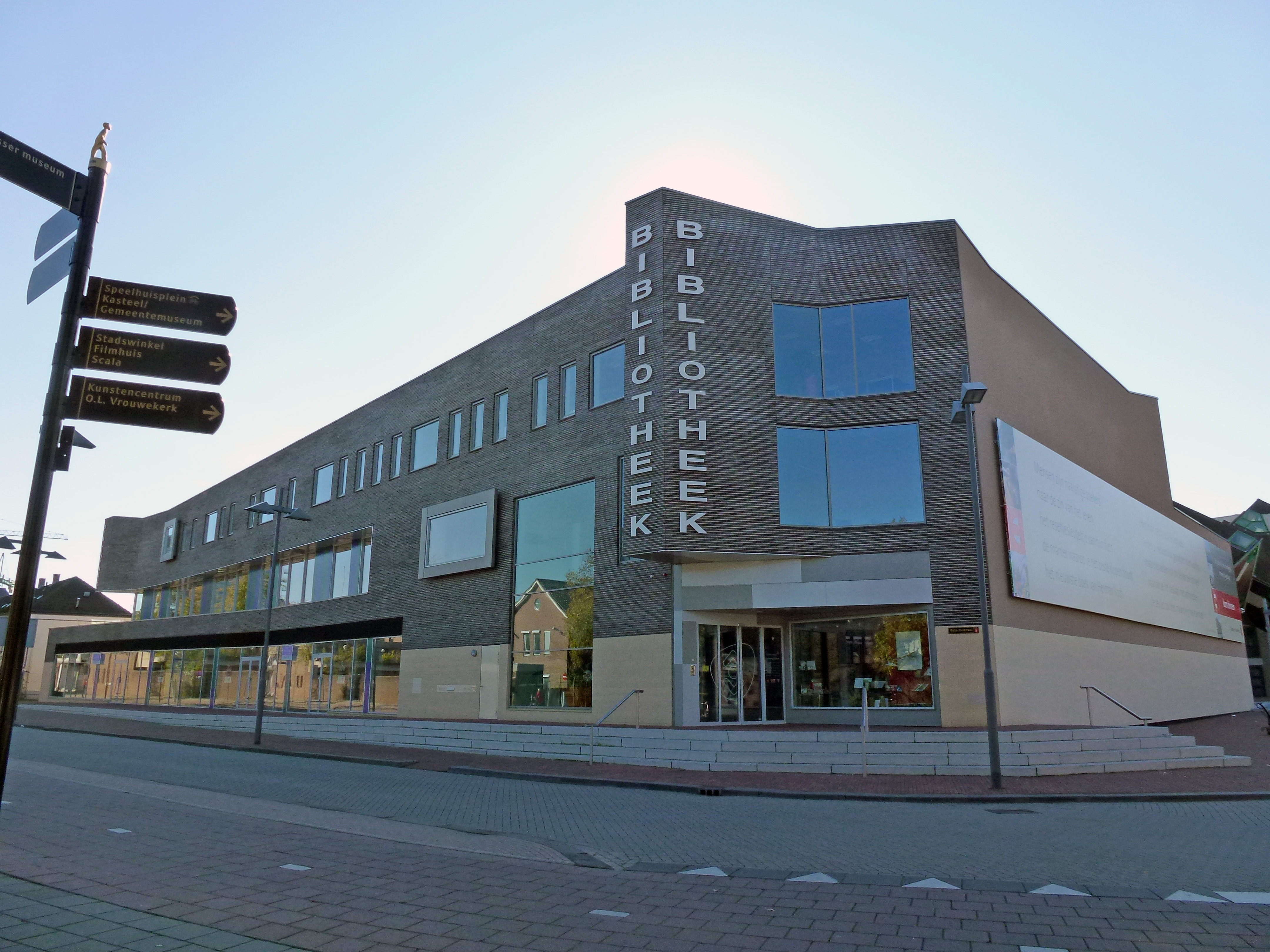 Bibliotheek Helmond